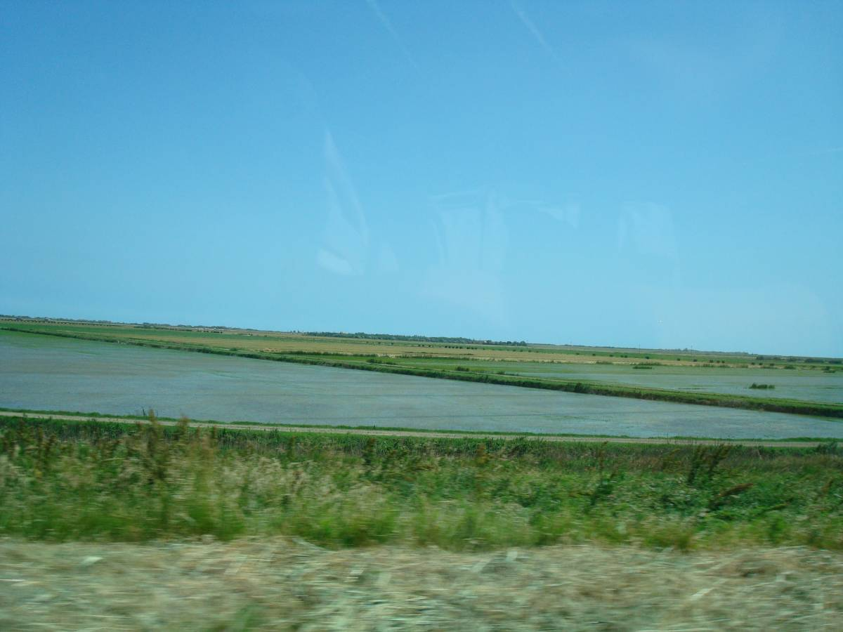 Rizières de la commune de Porto Tolle (Delta du Pô), prov.rovigo, Italie